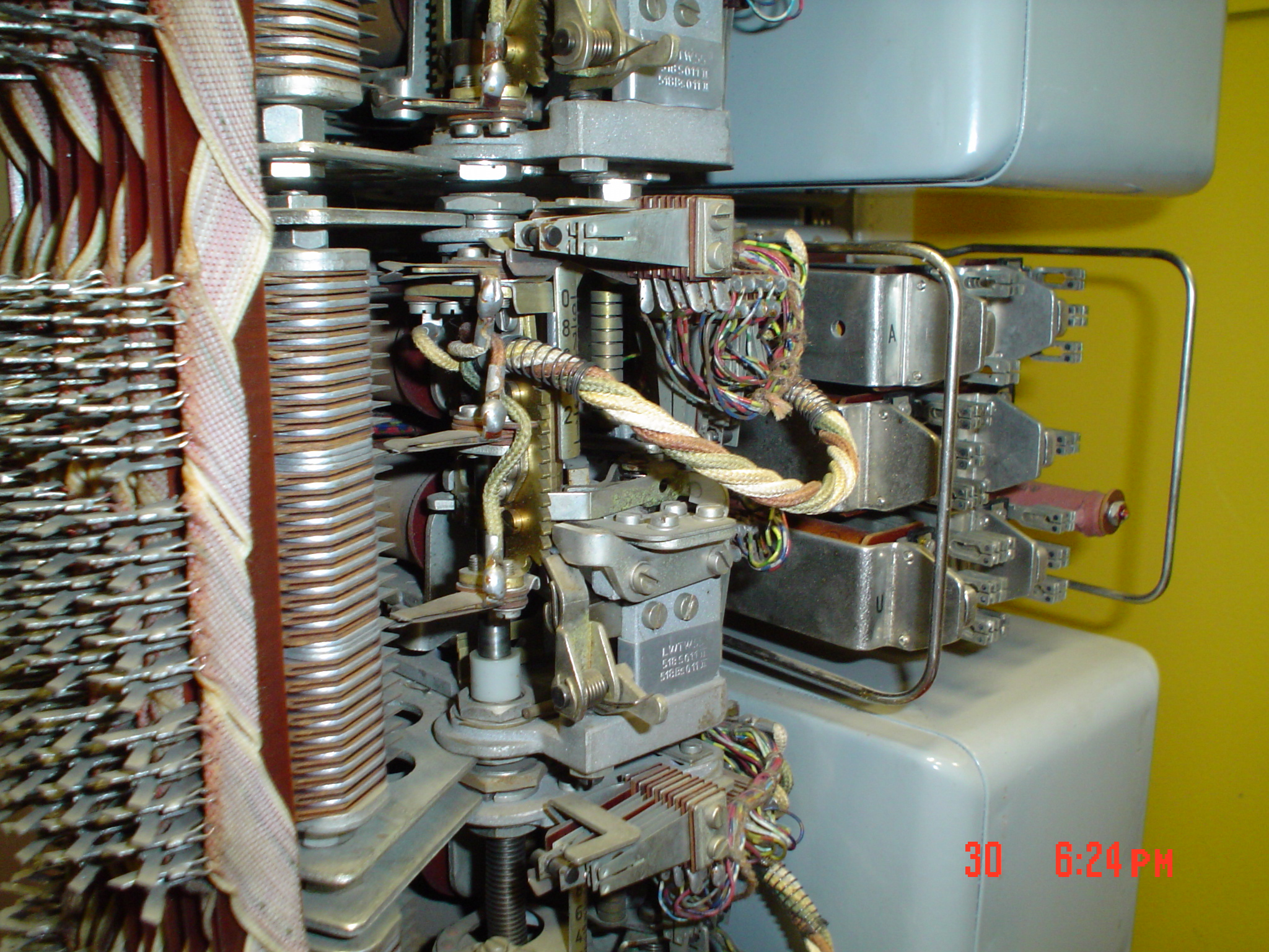 Perfektigita_maŝino_de_Strowger. Aŭtomataj Strowger-centraloj estis ne nur telefonaj, sed ankaŭ telegrafaj.